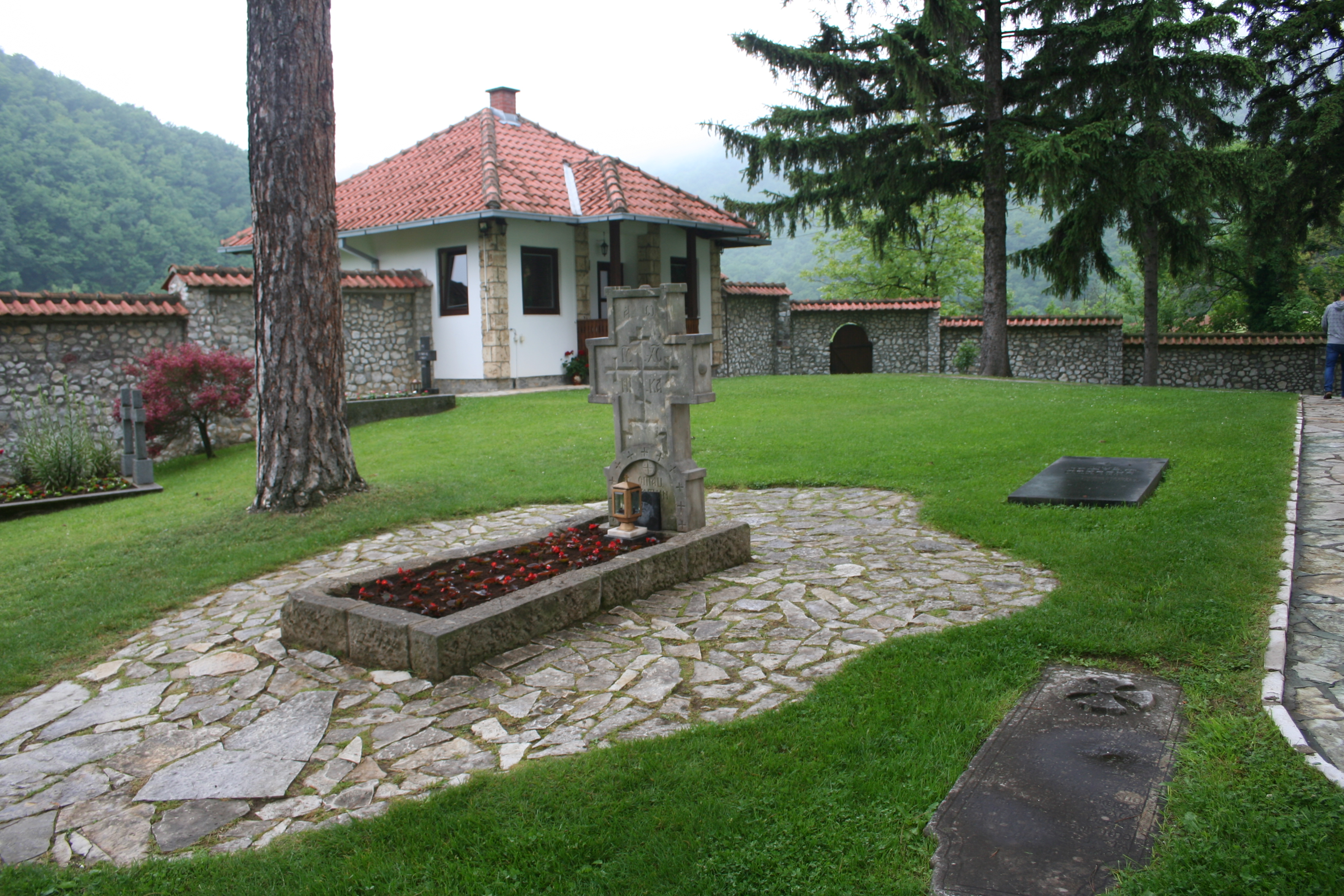 Manastir Ćelije